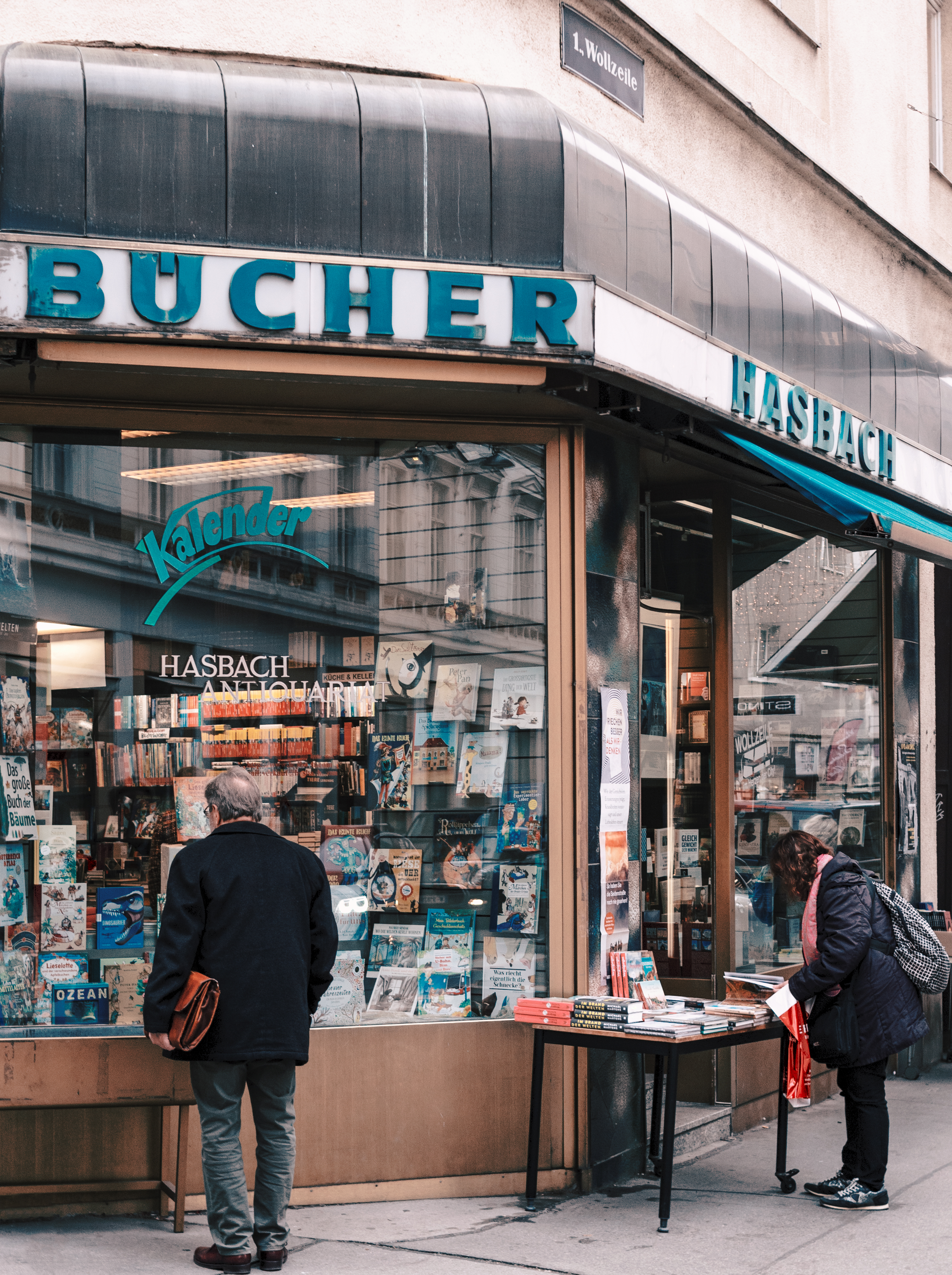 Buchhandlung & Antiquariat Hasbach in der Wollzeile 29, 1010 Wien